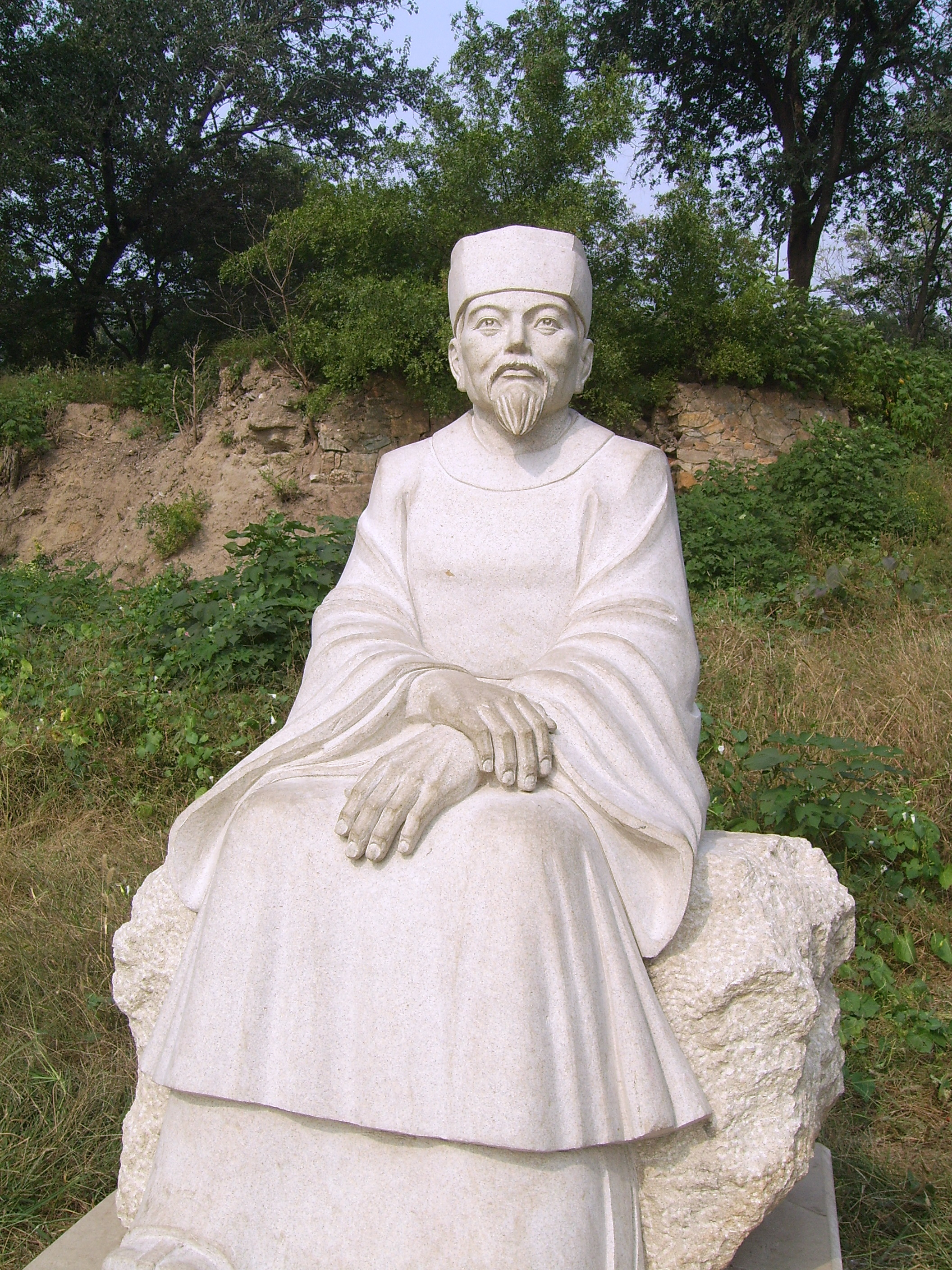 周敦颐雕塑，位于圆明园